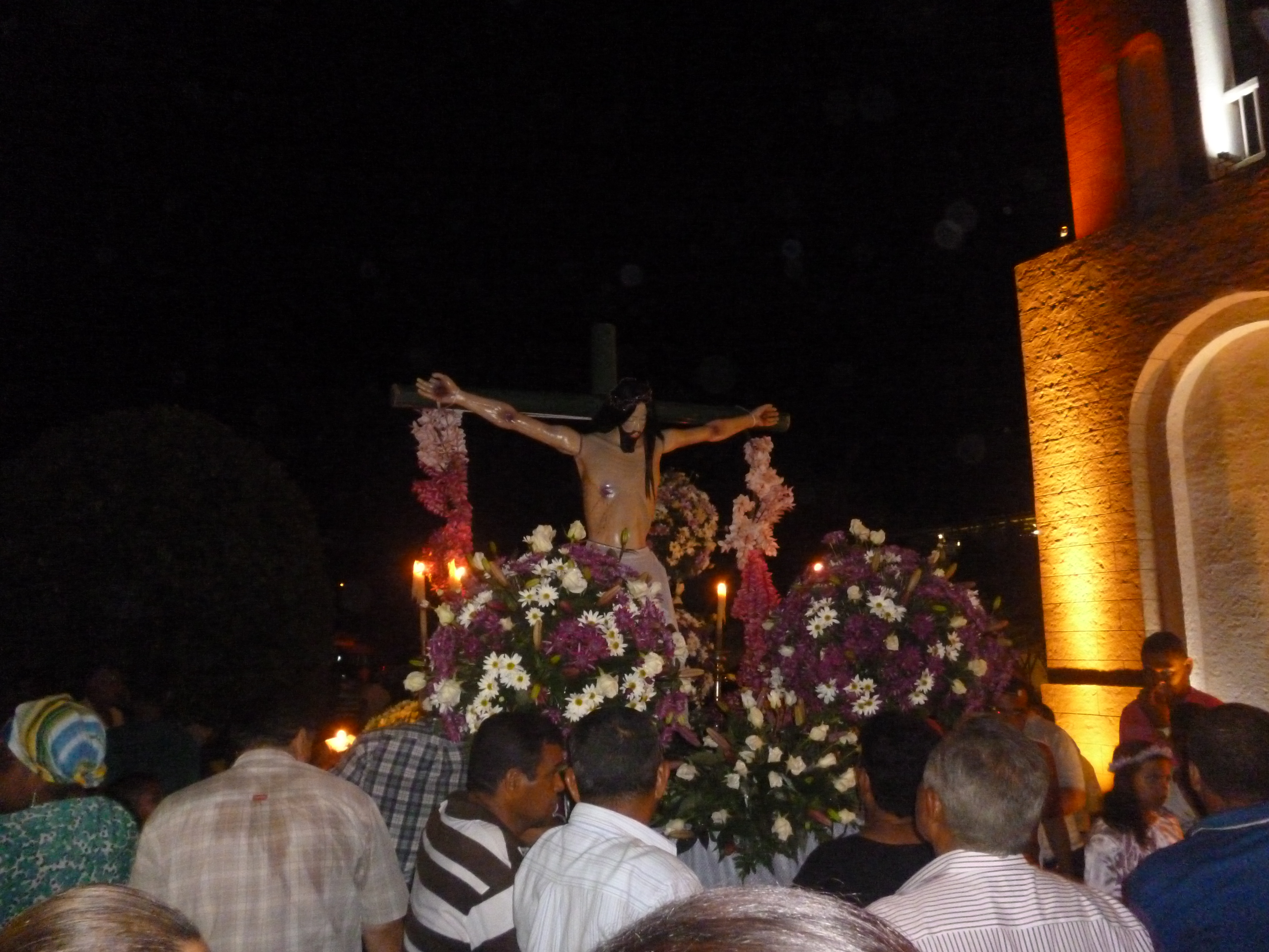 preparado para pam procesion el Viernes de Dolores